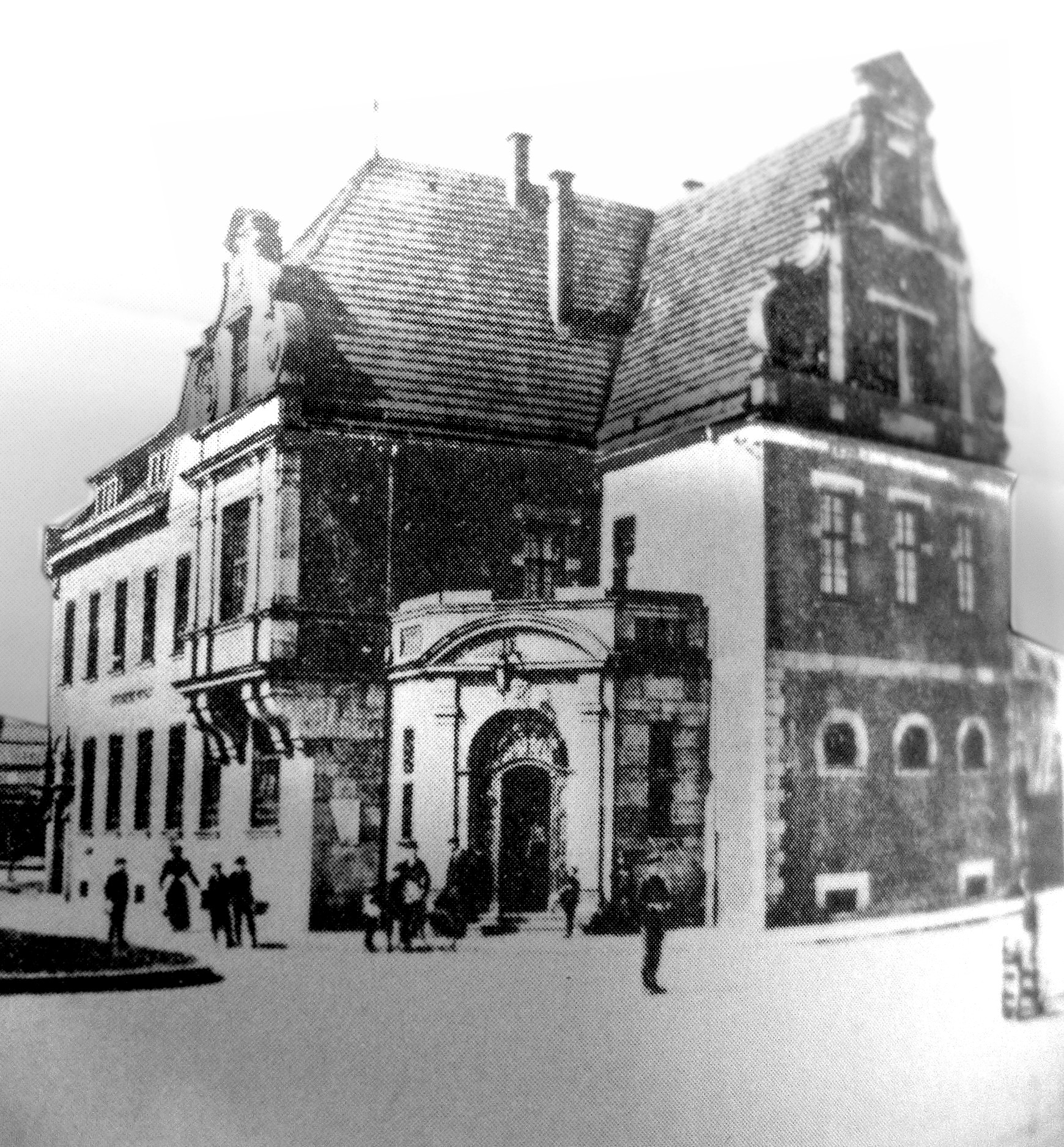 Postamt Dillingen/Saar, Neorenaissance, erbaut 1906–1907, (Stadtarchiv Dillingen/Saar)